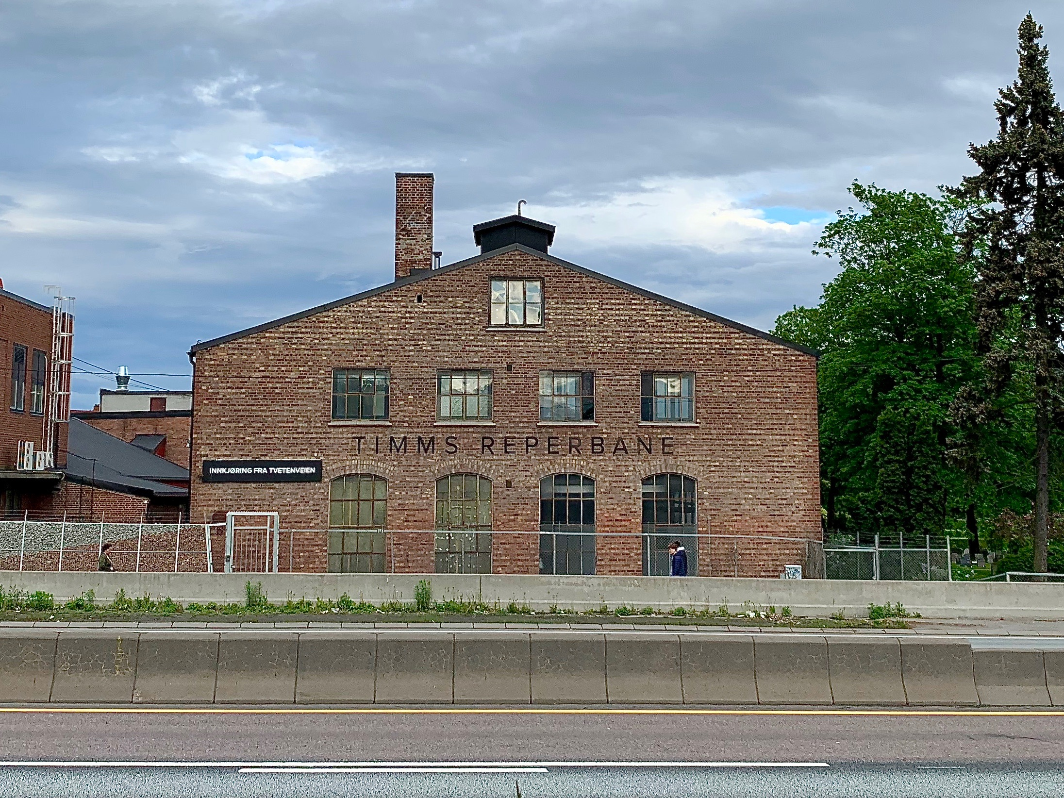 Timms Reperbane på Helsfyr i Oslo.